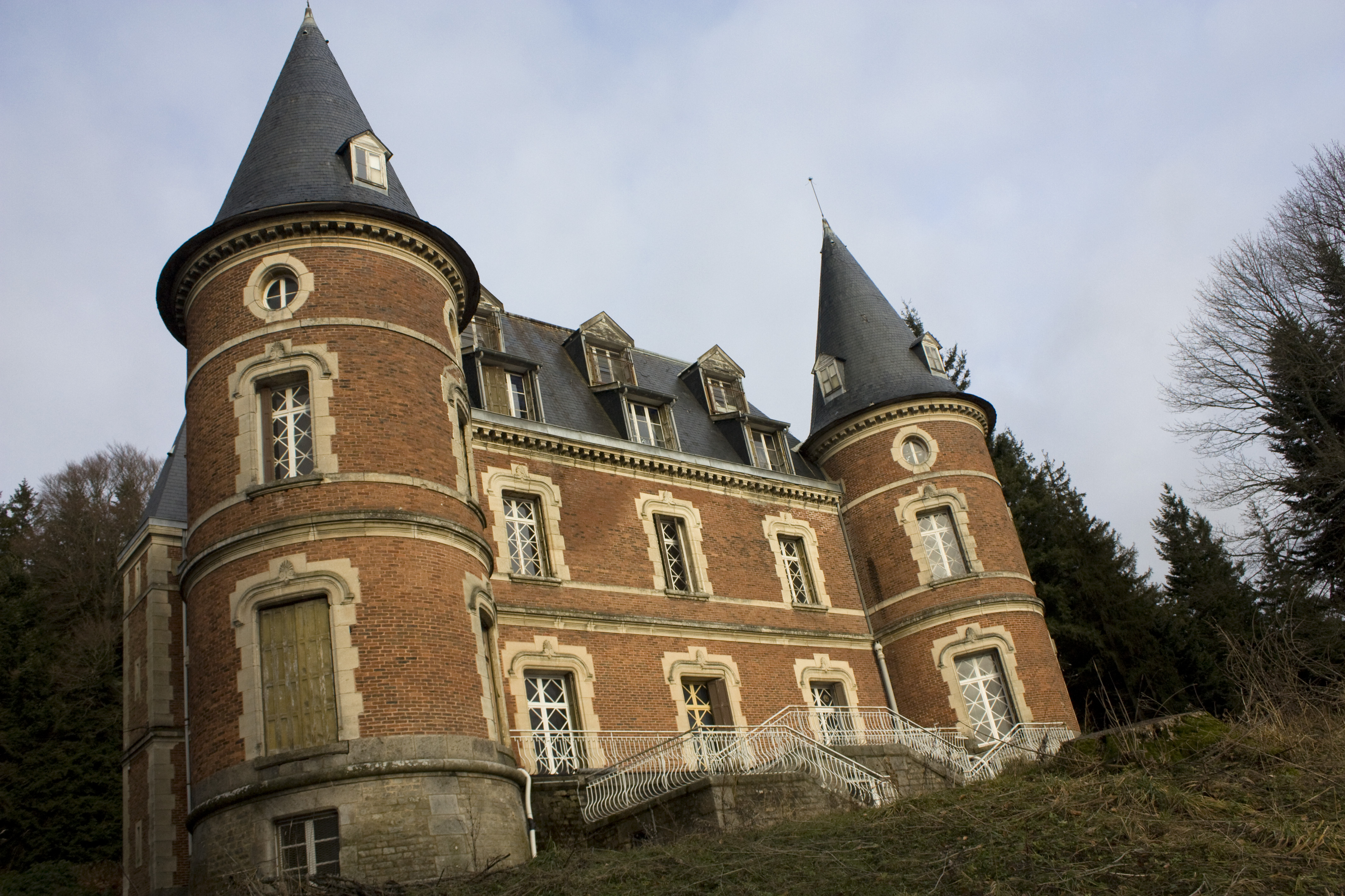 Château de Pérusel-Façade Sud